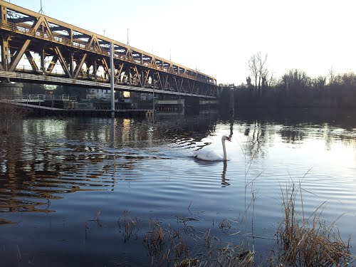 Inizio del Ticino inferiore al ponte di Sesto Calende; in primo piano un esemplare di Cygnus olor (cigno reale)